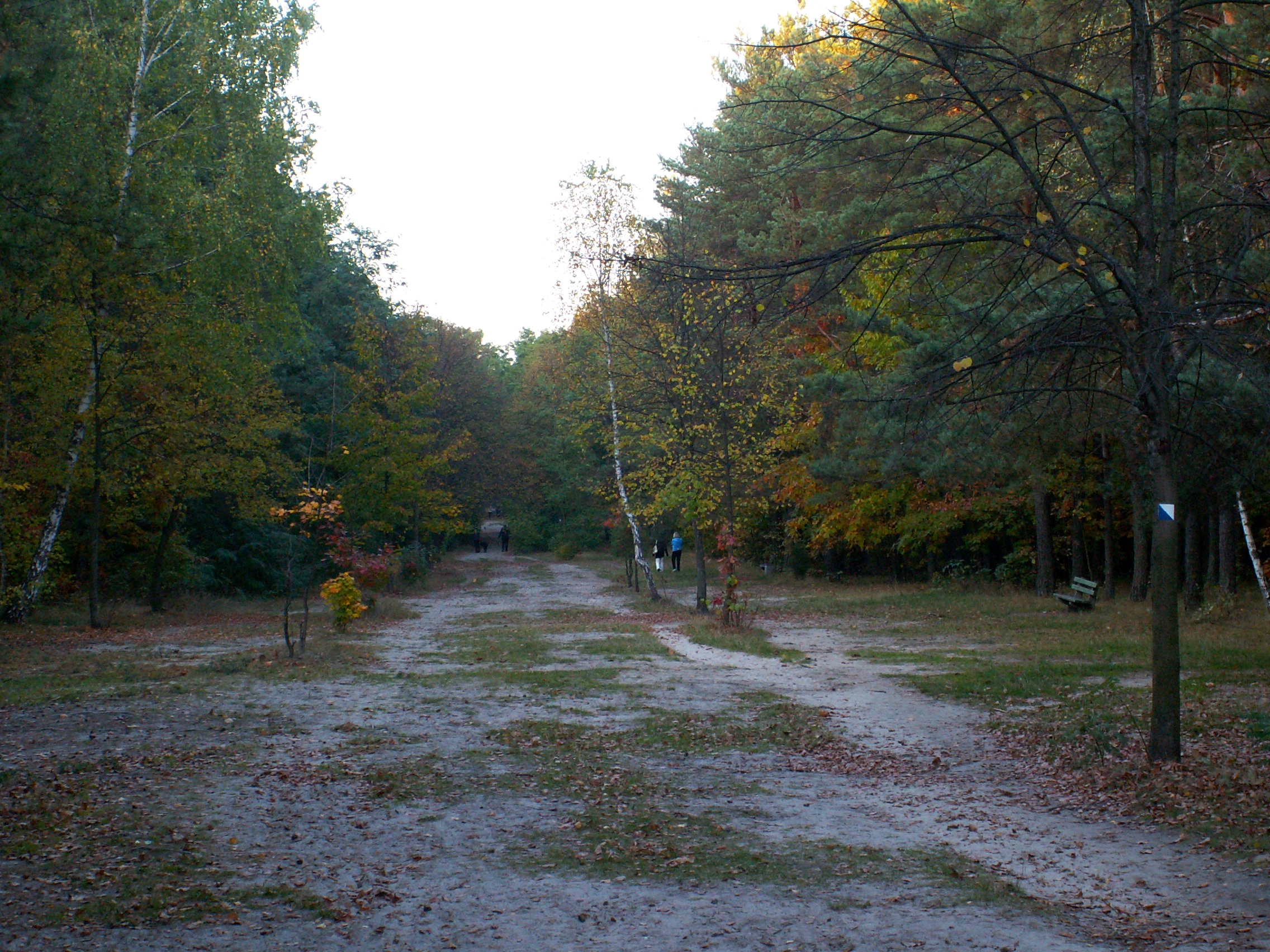 Stadion Leśny w Kielcach